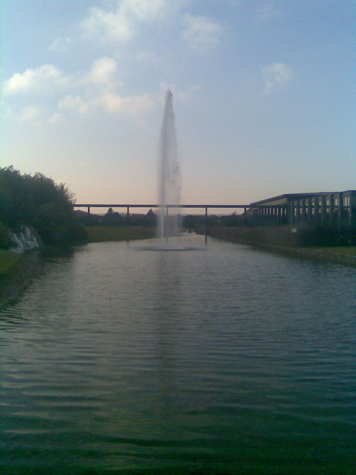 Jet d'eau du parc de la cité de l'eau à Amphion-les-Bains.